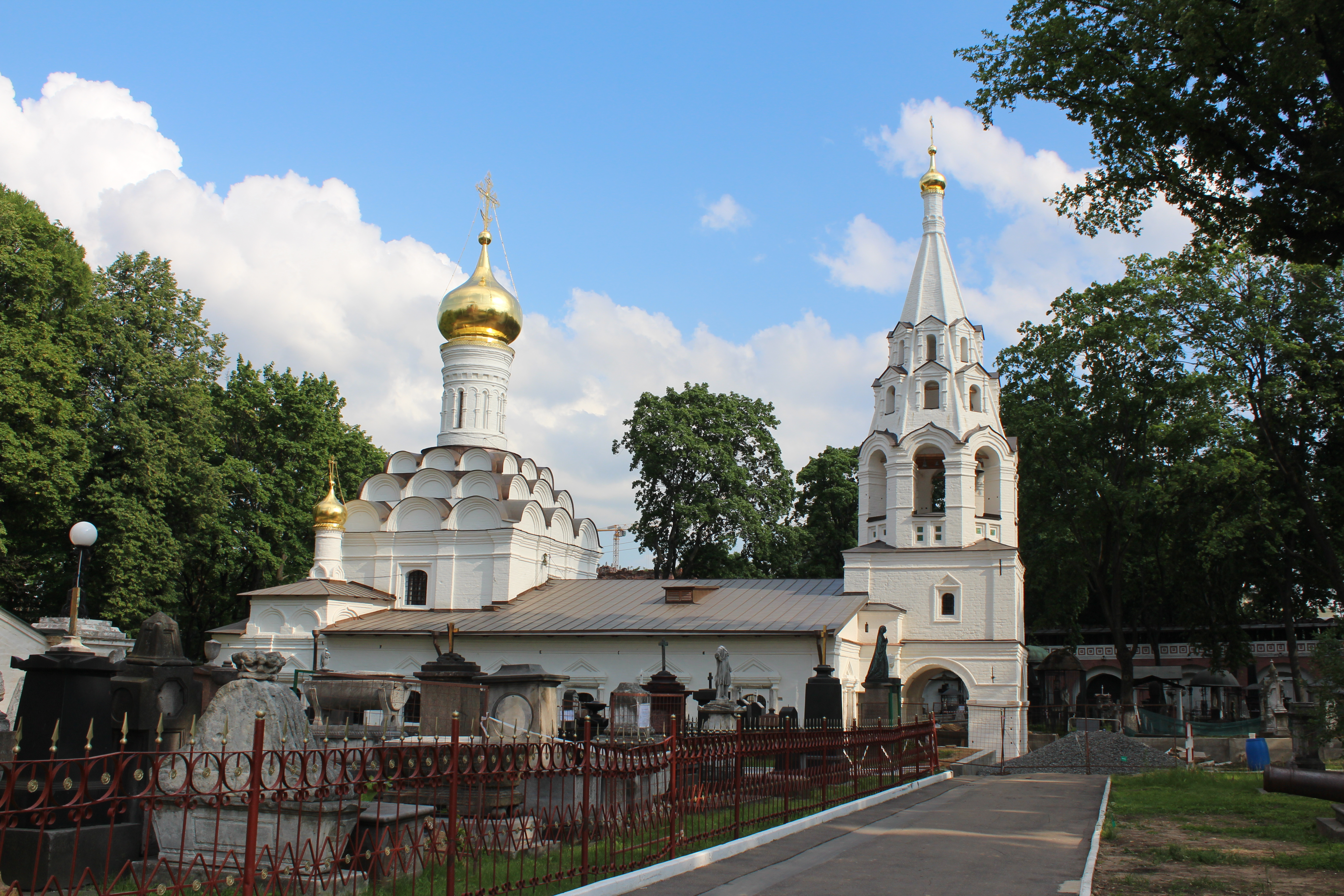 Ансамбль Донского монастыря: Донская пл., Донской, Южный округ, Москва